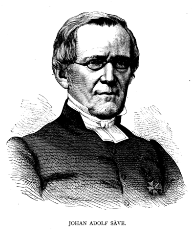 Johan Adolf Säve